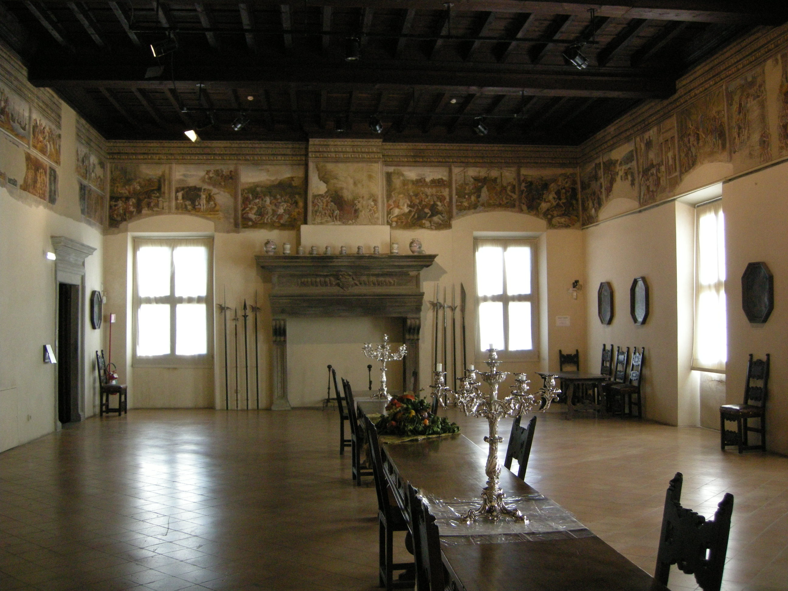 Palazzo vitelli alla cannoniera, salone